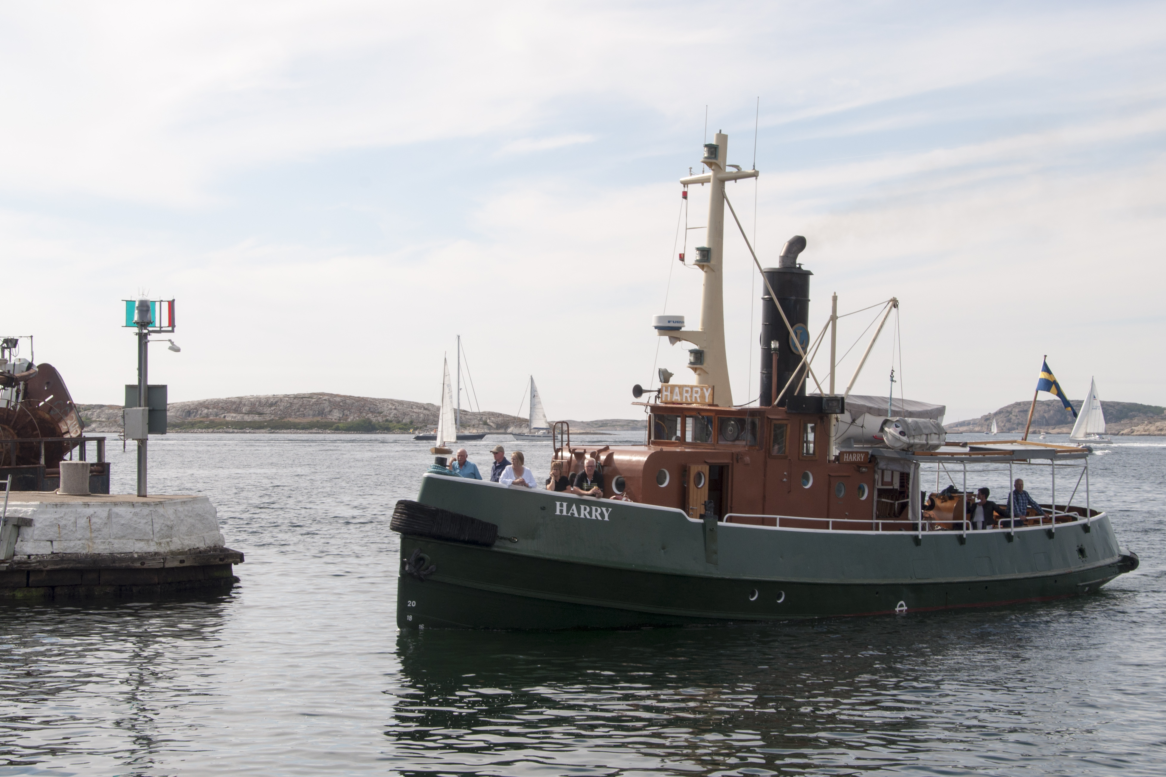 Bogserbåten Harry i Grundsunds hamn